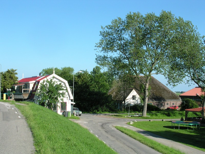 Uitzicht vanaf de dijk op de buurtschap Kreil. The hamlet of Kreil seen from the dyke.